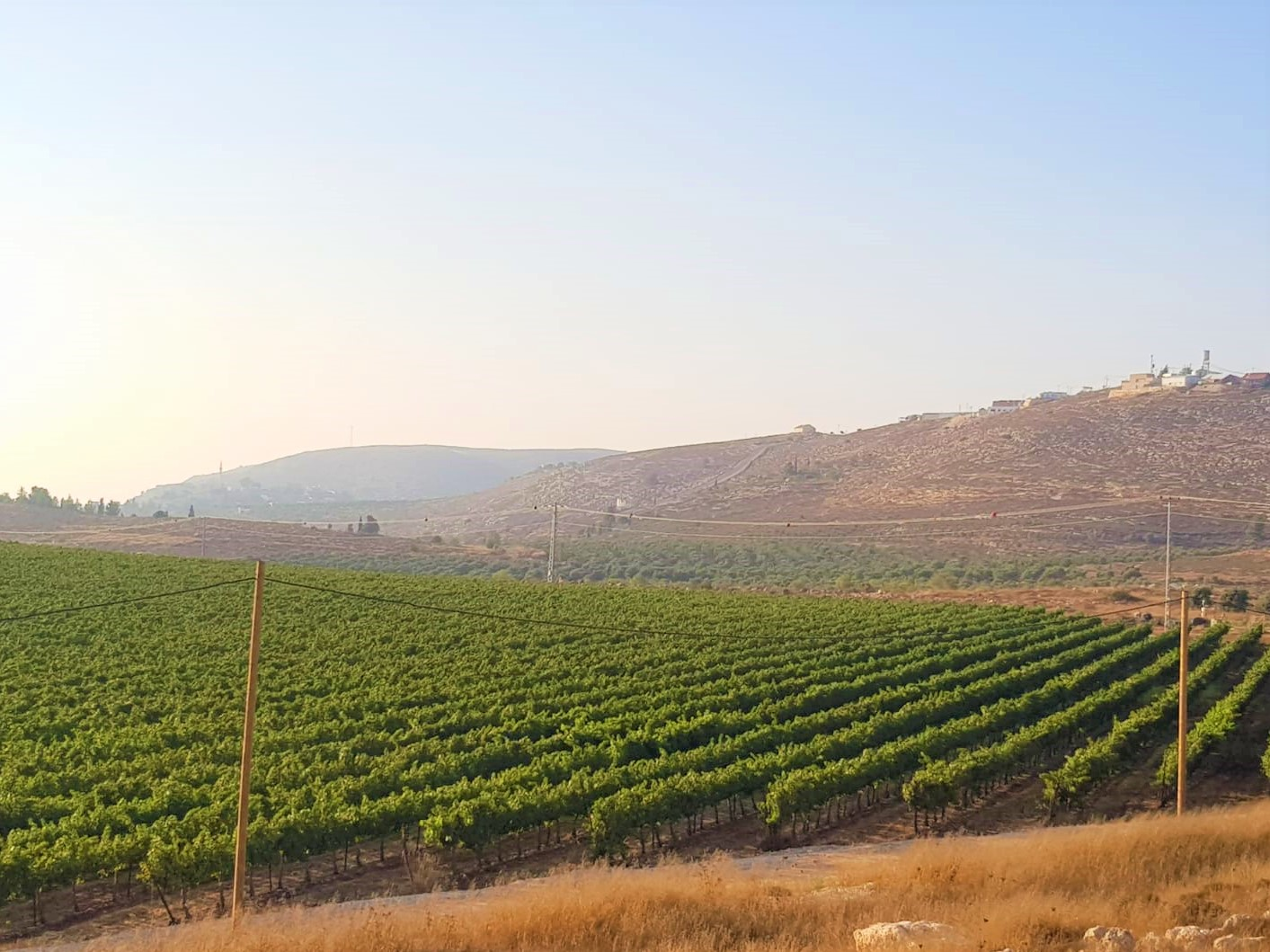 כרם בעמק שילה צילום קיץ 2019